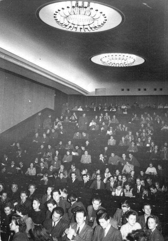 Berlin, Theater der Freundschaft, Zuschauerraum Illus Quaschinsky 25.11.50 Theater der Freundschaft in Berlin. Mitte November 1950 wurde im Zentralhaus der Jungen Pioniere in Berlin-Lichtenberg das Theater der Freundschaft eröffnet. UBz: Blick in den Zuschauerraum.